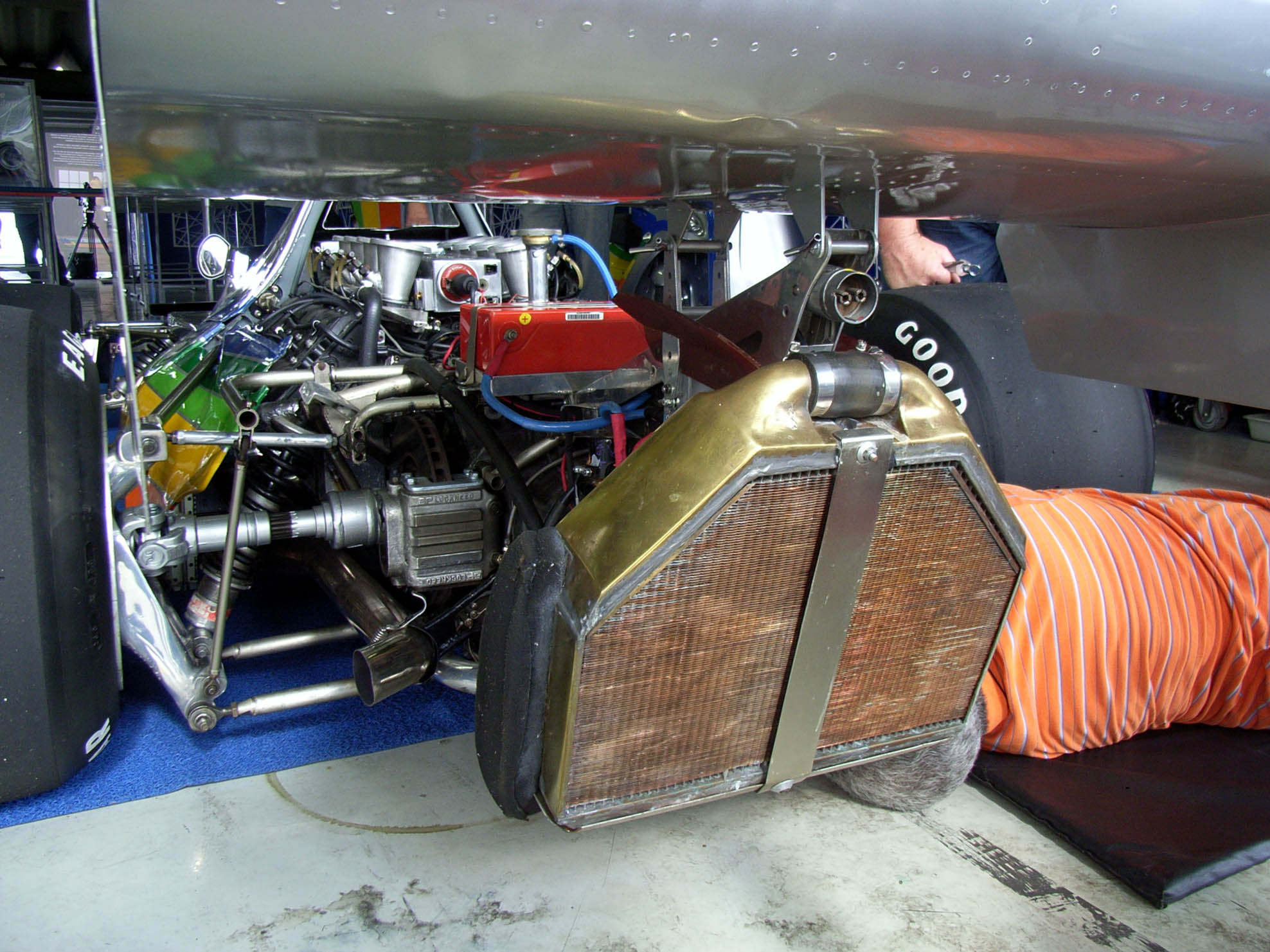 Radiator: Fittipaldi FD-01 (restored)